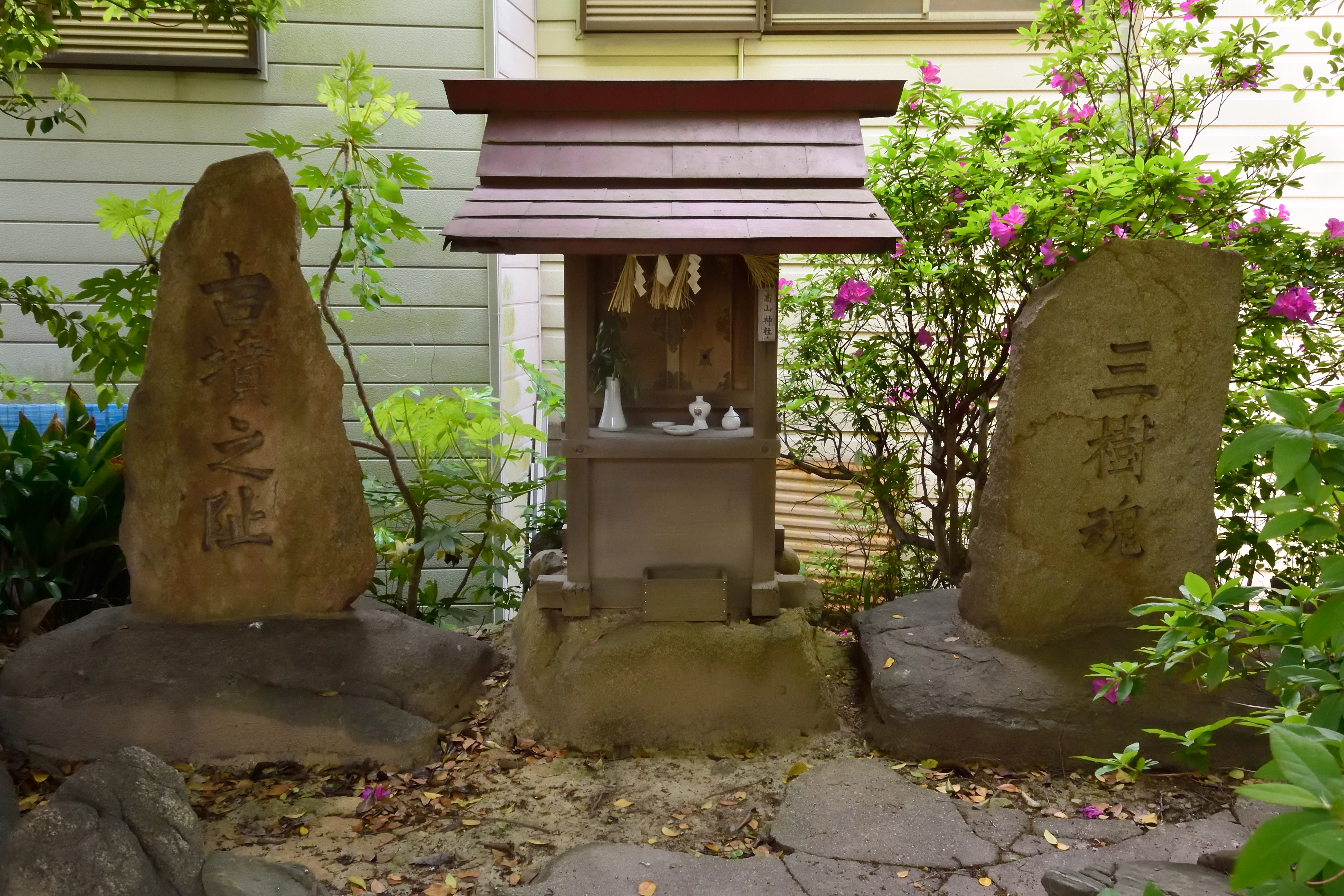 高山古墳石碑